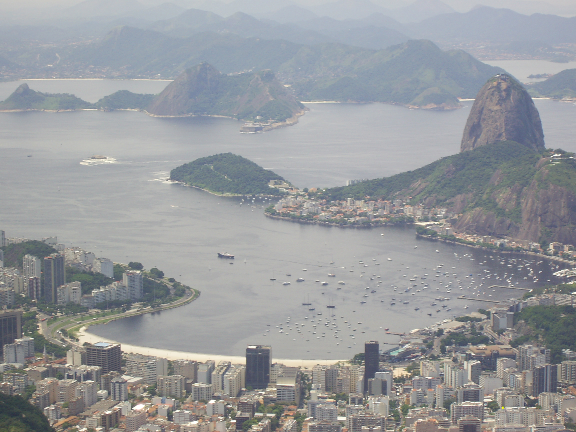 Panoramic view of Botafogo Bay (Baía de Botafogo), Urca, and Sugarloaf mountain (Pão de Açúcar) — in Rio de Janeiro, Brasil.